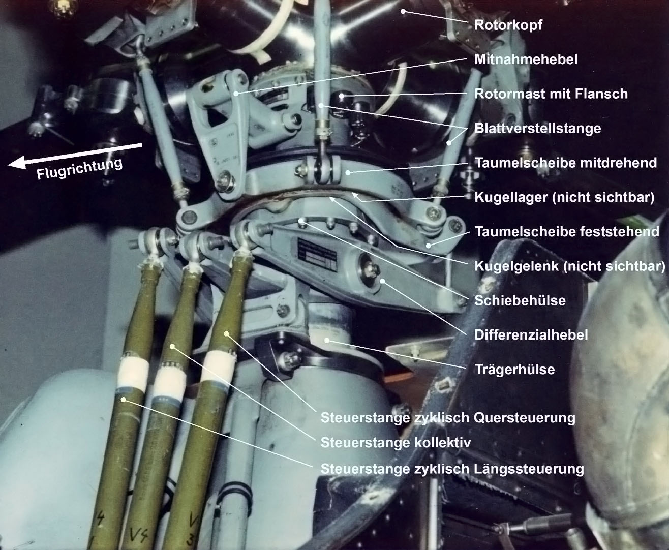 Darstellung der Taumelscheibe mit eingelegter Teilebenennung // farbkorrigiert, denoised